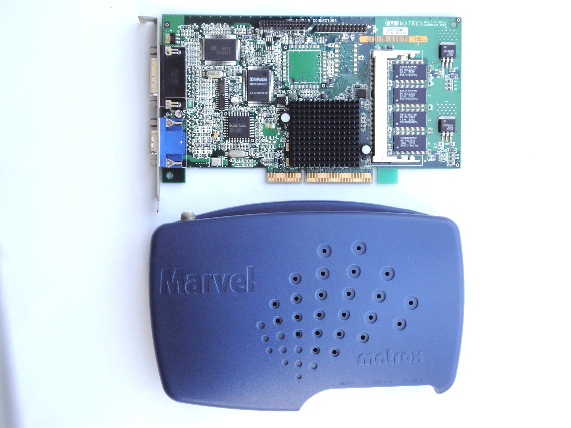 Matrox Marvel G200TV